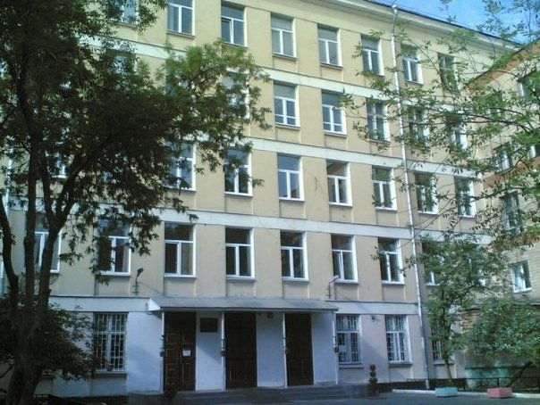 Гимназия в Малом Кисловском переулке